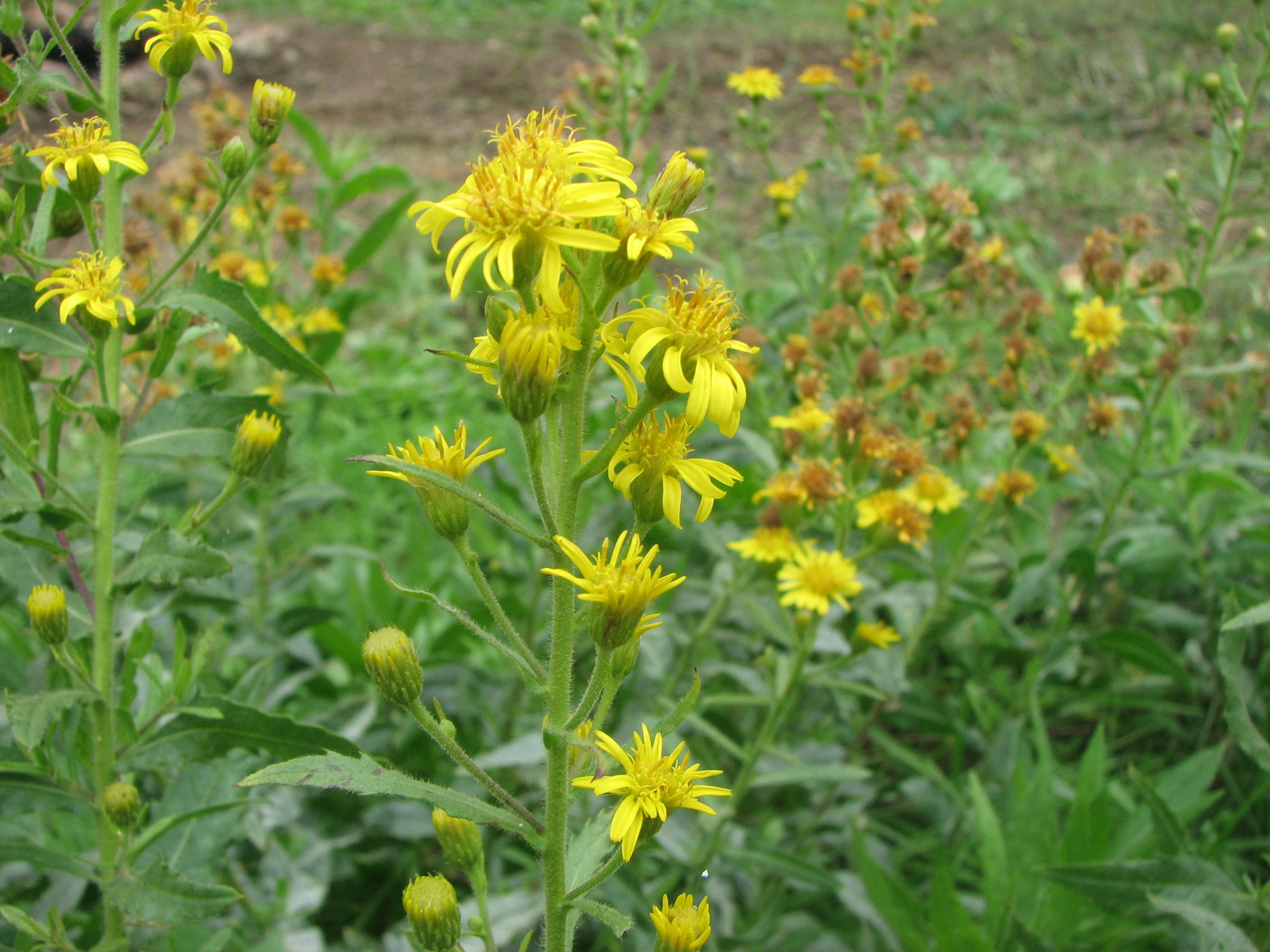 Inula viscosa "a pecita", from Corsica